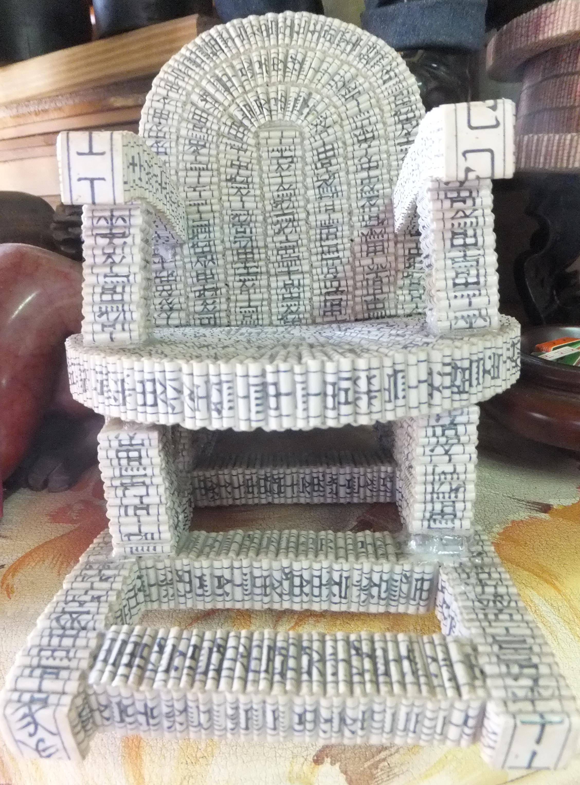 中文（台灣）: 四色牌折成的椅子，攝於新竹湖口。